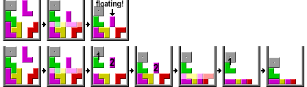 Gravedad en el Tetris. Imagen formada a partir de es::en:Image:Tetris gravity (simple).png y es::en:Image:Tetris gravity (natural).png